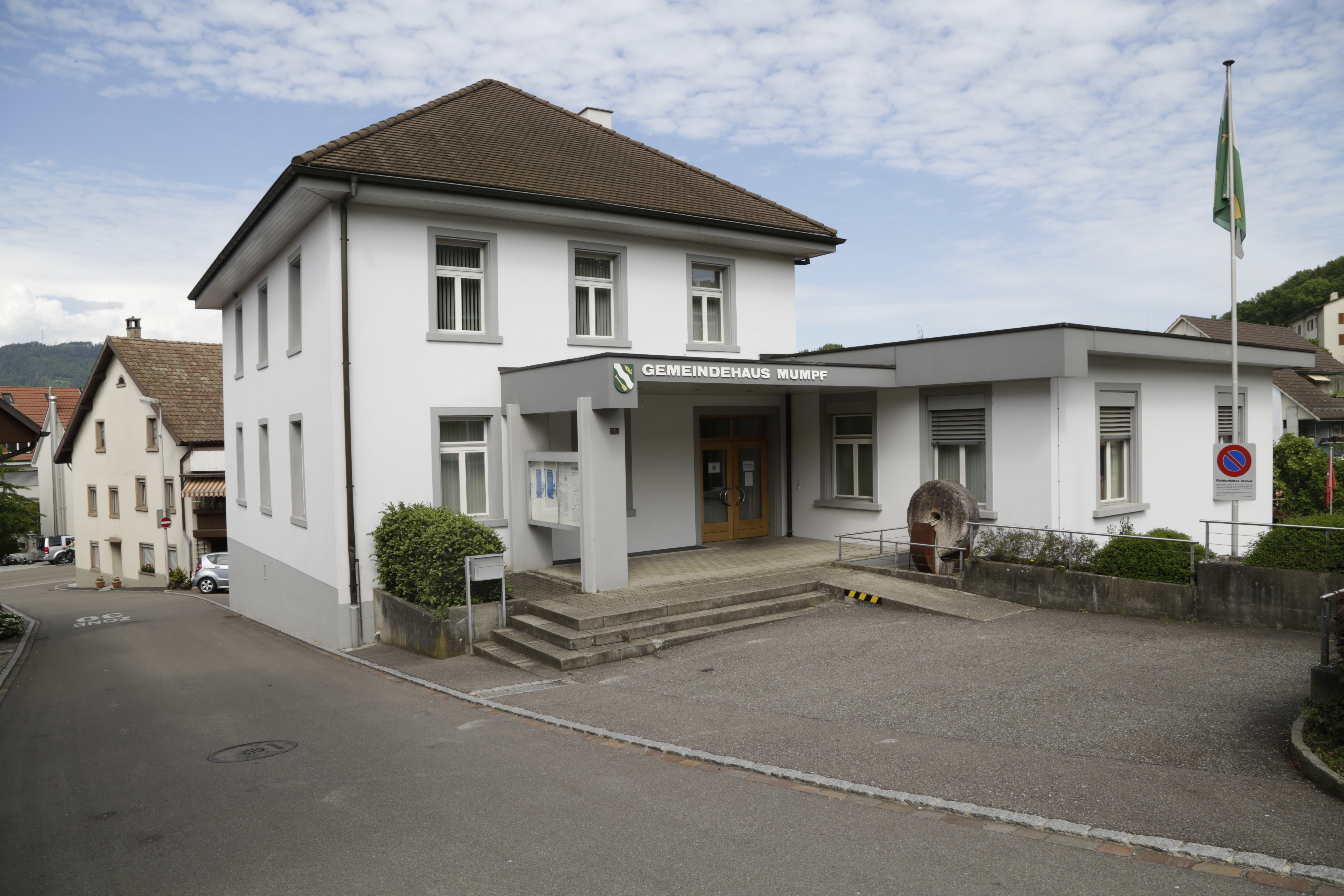 Das Gemeindehaus der politischen Gemeinde Mumpf (Schulgasse1).